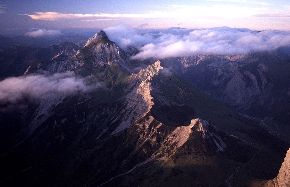 Gamsjochgruppe vom Laliderer Biwak, Karwendel, Alpen Photograph: Luidger (21. Juli 2001)